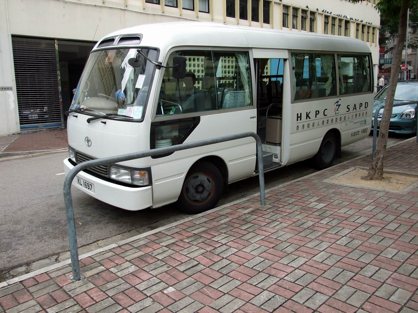 香港殘疾人奧委會暨傷殘人士體育協會接載運動員的專車